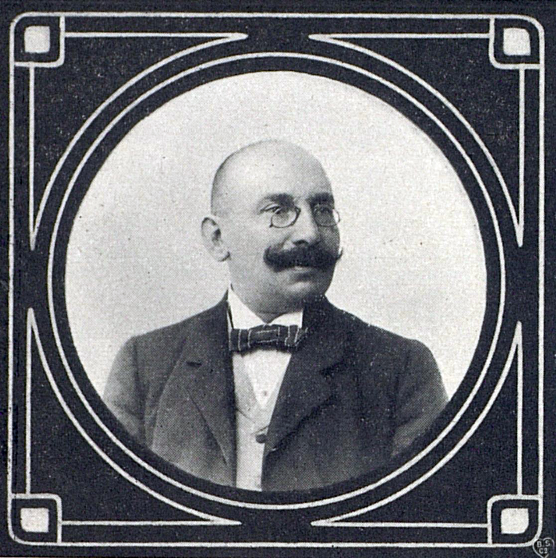 Direktor Jacques Glück, Abbildung in Zeitschrift Apollo-Theater Düsseldorf, vom 15. September 1906